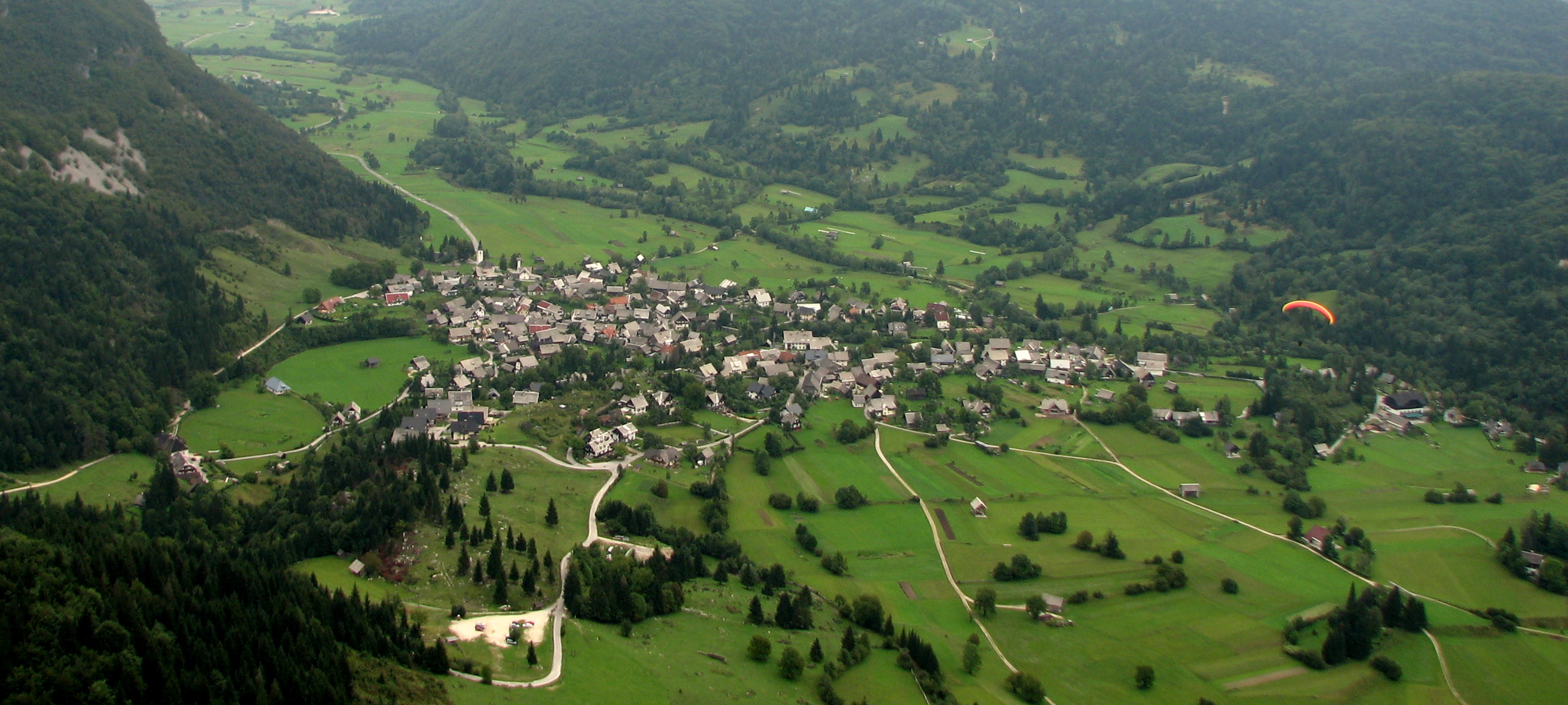 Ribcev Laz seen from a paraglider